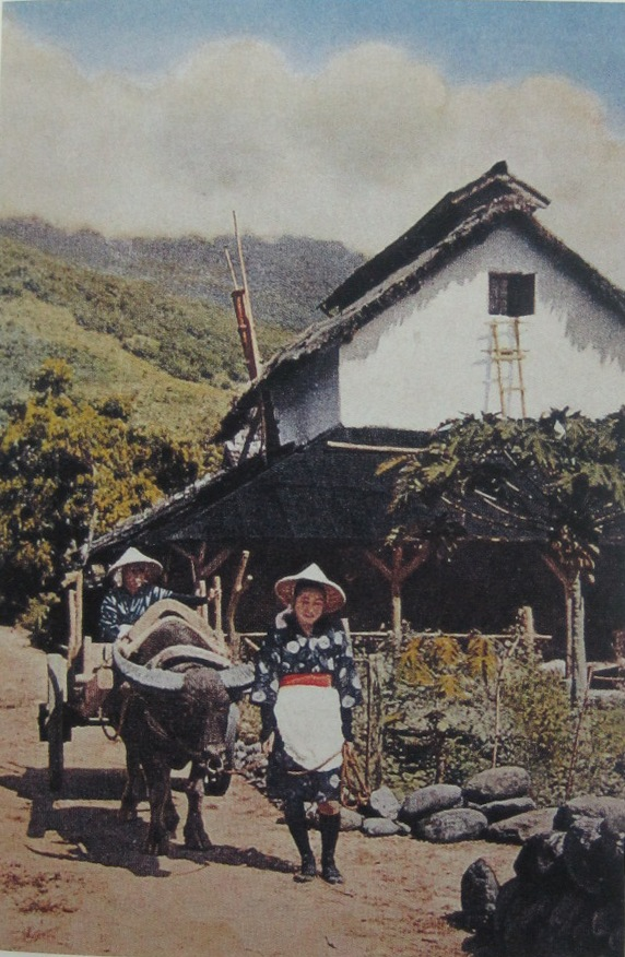 花蓮吉野村